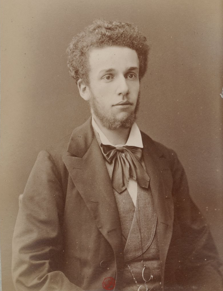 Paul Véronge de La Nux (1853-1928)